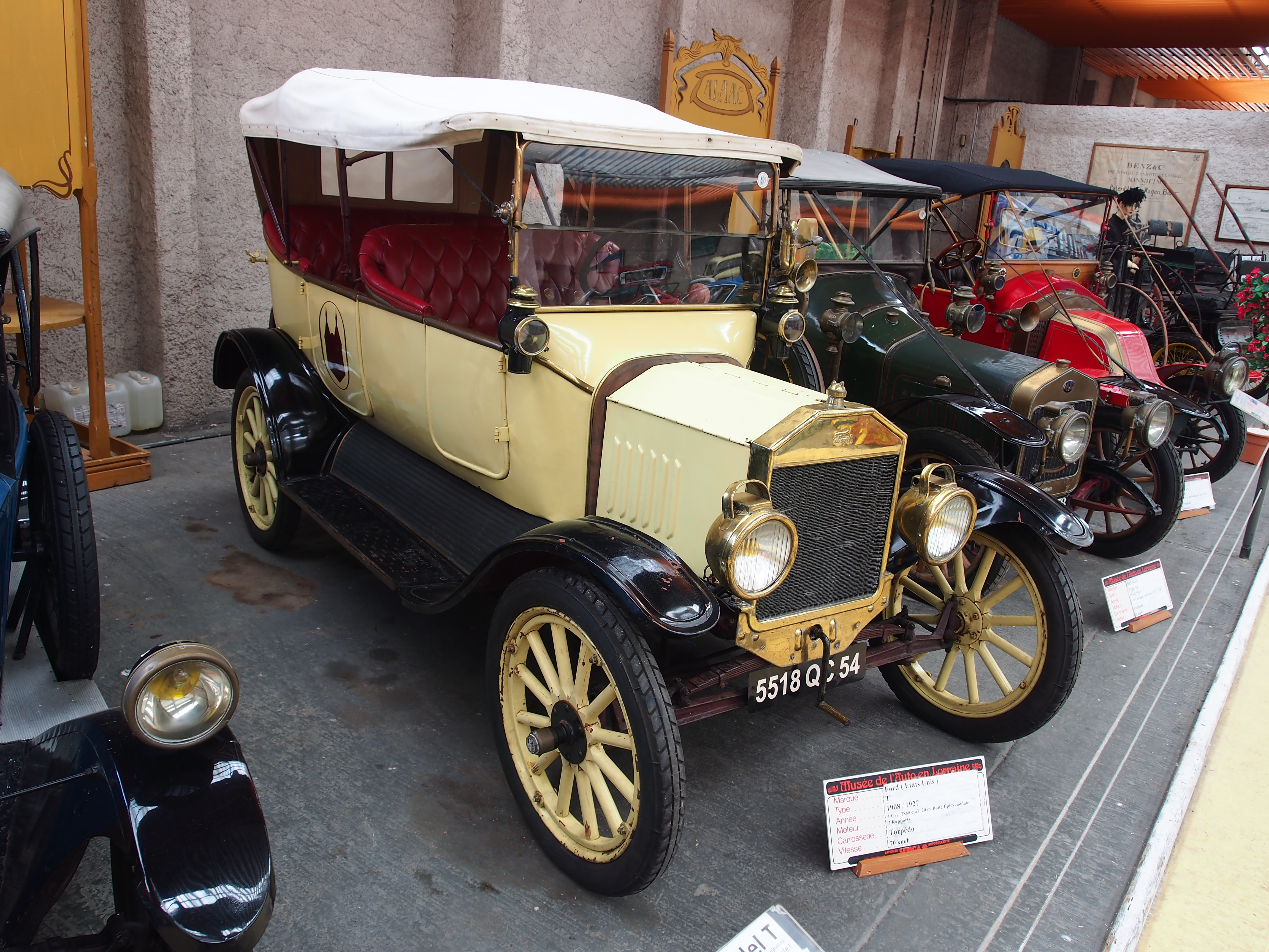 Photographed at the Association Lorraine des Amateurs d'Automobiles de collection et de loisirs.